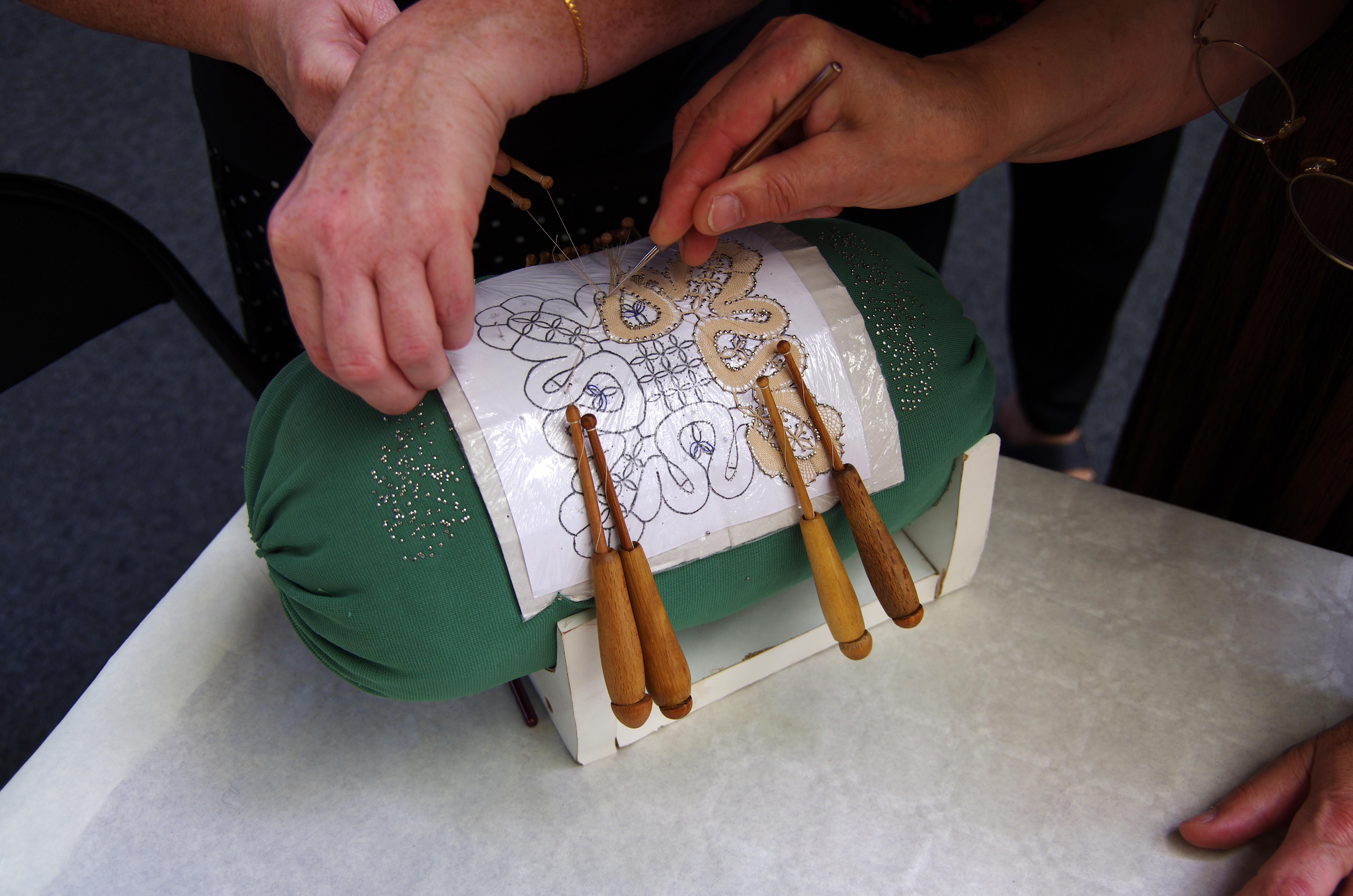 Longueau (Somme, France) - REAL Acte II « Rencontres Européennes Artisanales de Longueau » - Après-midi du deuxième jour d'animation festive au Parc des sports (rue Lucette Bonard). Dans la salle de tennis couverte, un stand est tenu par une dentelière qui montre son savoir-faire. On remarque que 6 fuseaux sont employés ici.